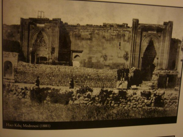 HACI KILIÇ CAMİ , 1881